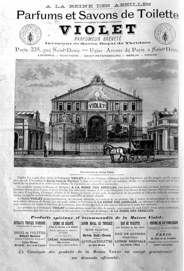 "Parfums et savons de toilette Violet" : French add published in a 1886 periodical (Paris and Saint-Denis). Dim. : 26 x 35 cm